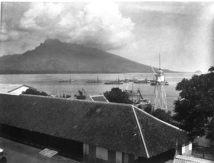 Foto. Enkele schepen op de rede van Panaroekan, aan Straat Madoera, Oost-Java